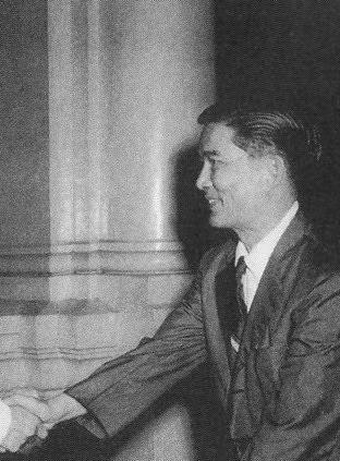 Ông cố-vấn chính-trị Ngô-đình-Nhu.